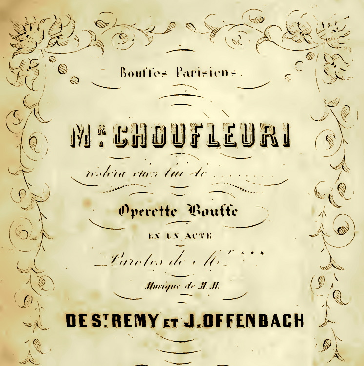 1re de couverture de la partition de l'opéra-bouffe Monsieur Choufleuri restera chez lui le... de Jacques Offenbach 1861.